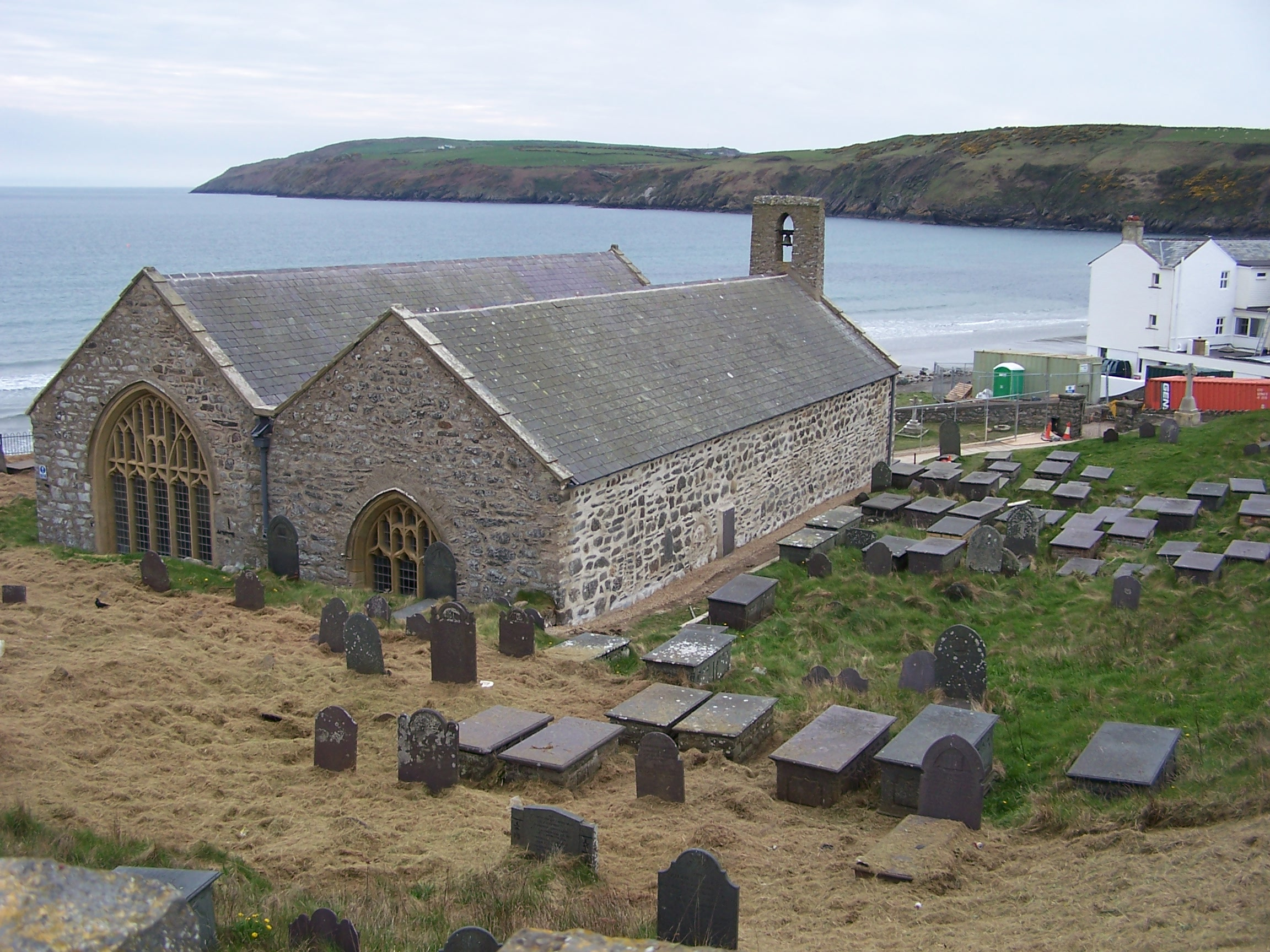 St Hywyn Church, Aberdaron, Gwynedd, North Wales.